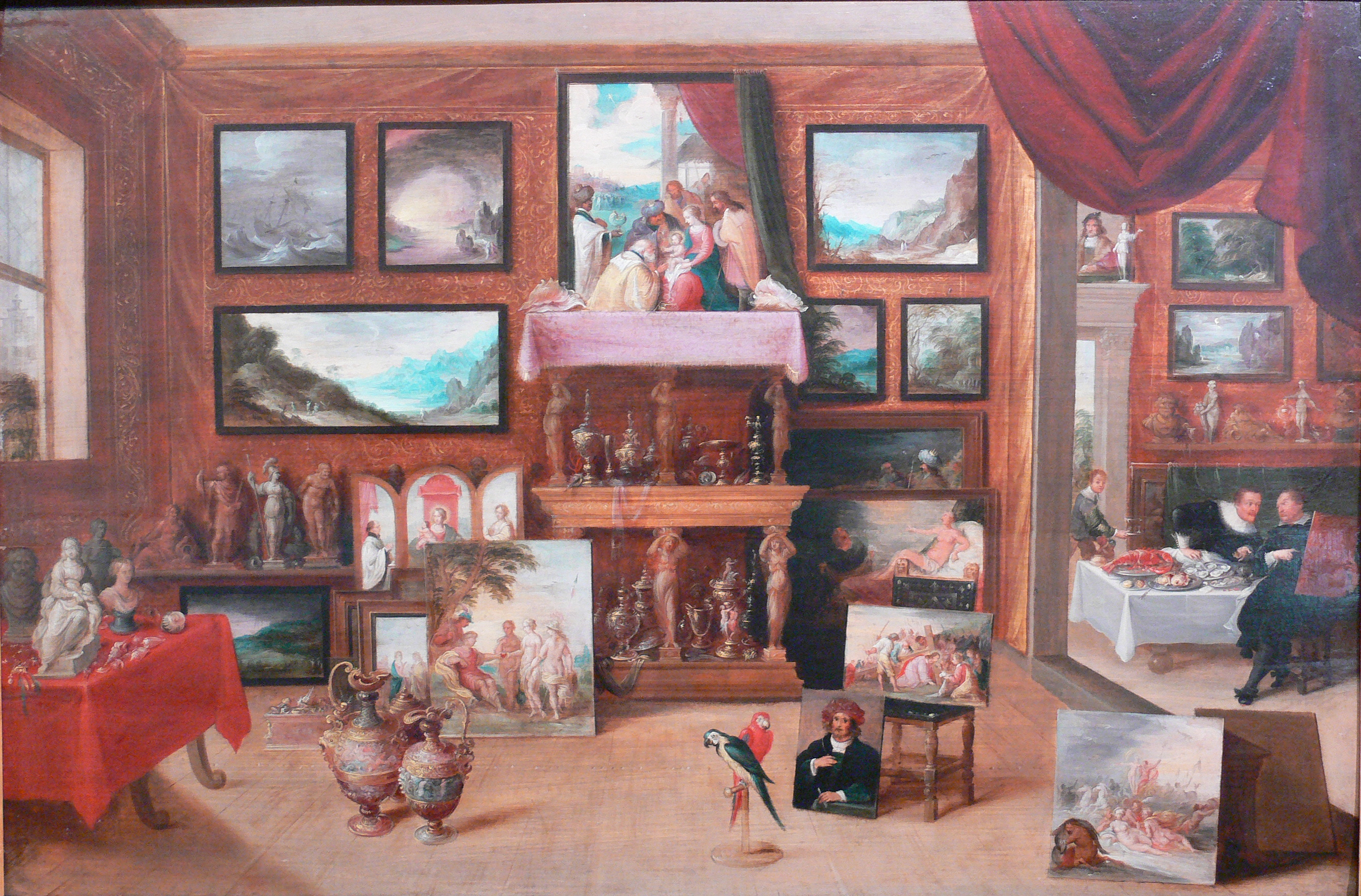 Eine frühneuzeitliche Kunst- und Wunderkammer (Maler, Titel, Datierung müssen noch nachgetragen werden) Gallery: Reiss-Engelhorn-Museen, Mannheim